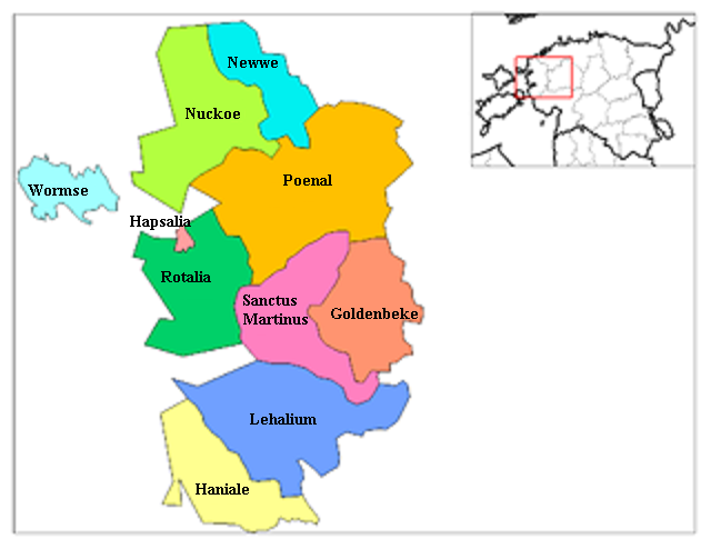 Rotaliae municipia Latine